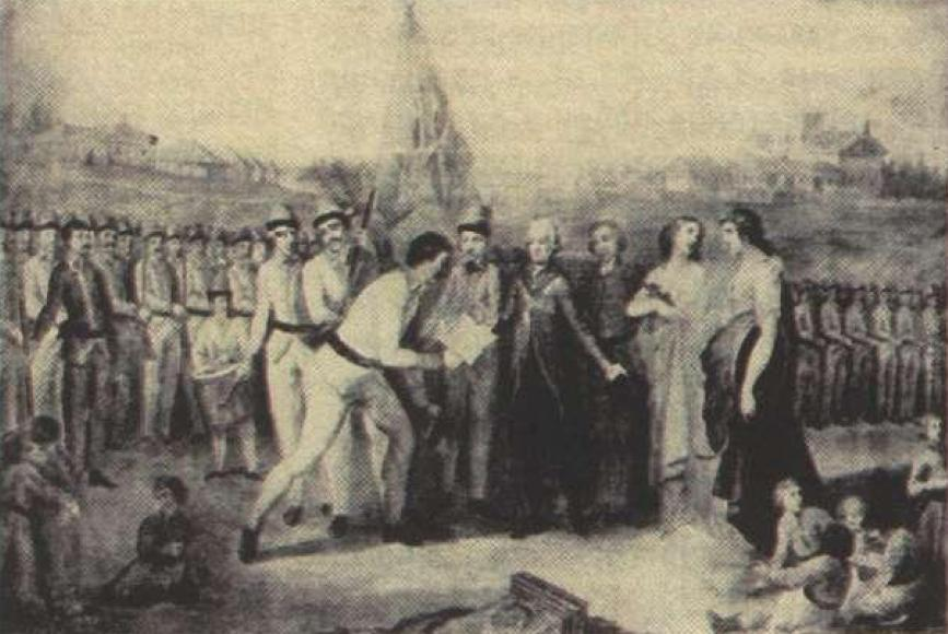 П. К. Бжостовский объявляет Статут крестьянам Павлово